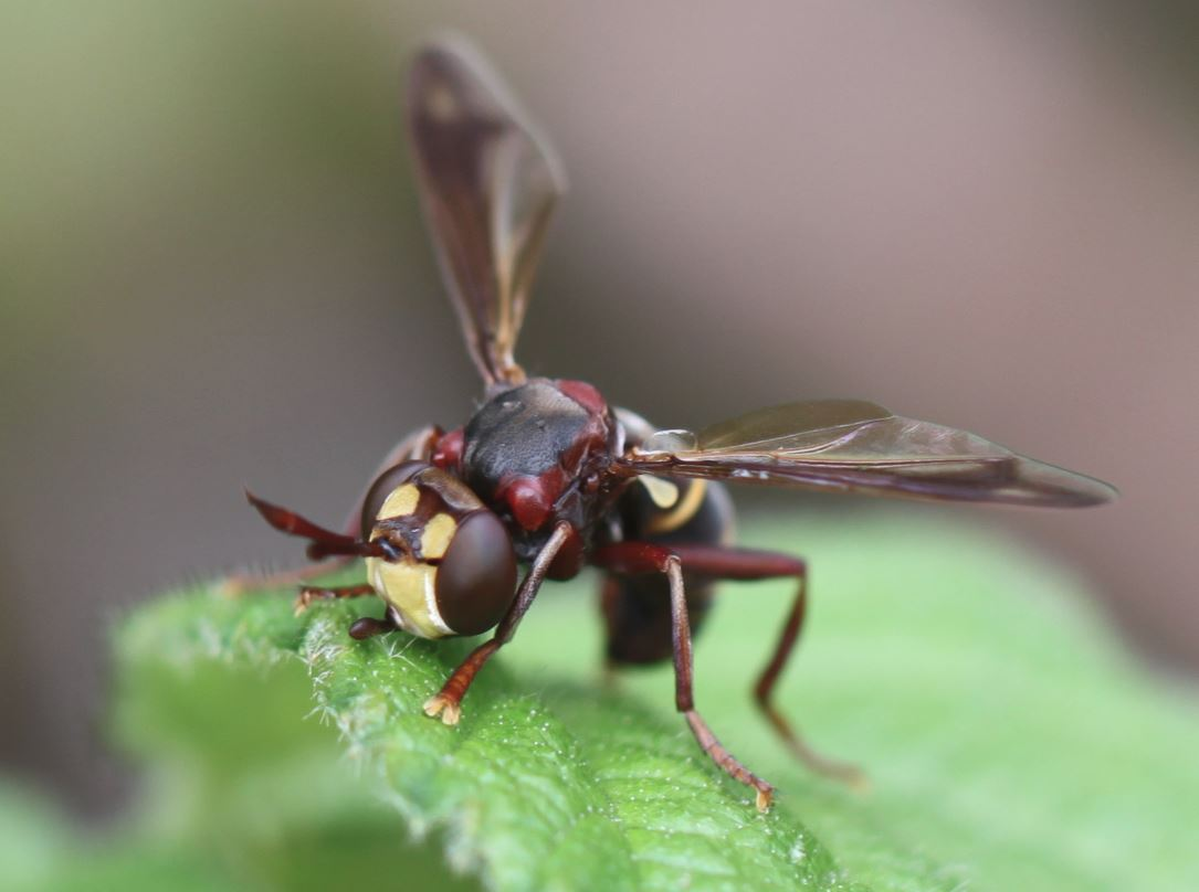 Große Wespendickkopffliege (Conops vesicularis) am 27. April 2019 in der Schwetzinger Hardt